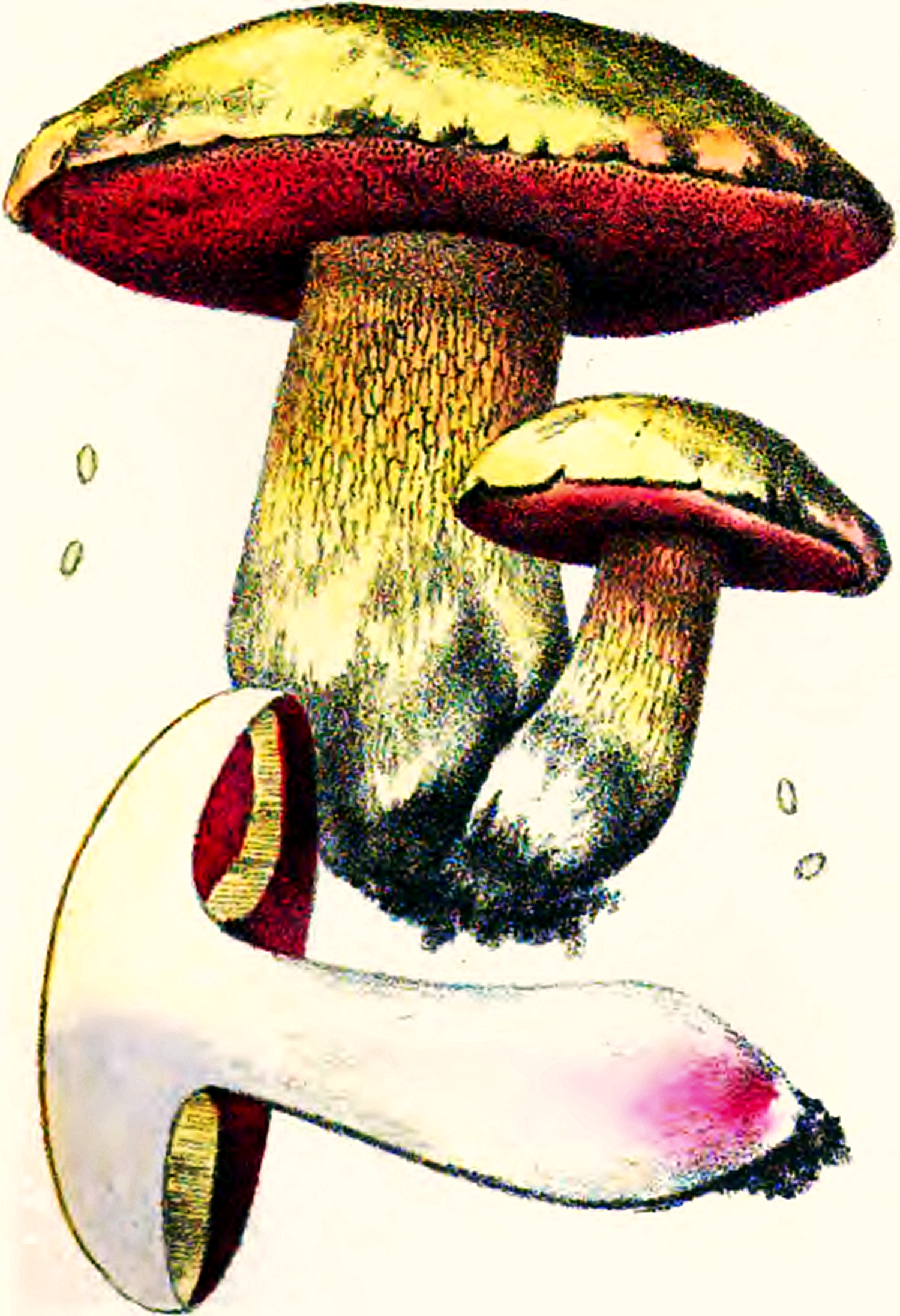 C. C. Gillet: Boletus rubeolarius = Boletus luridus